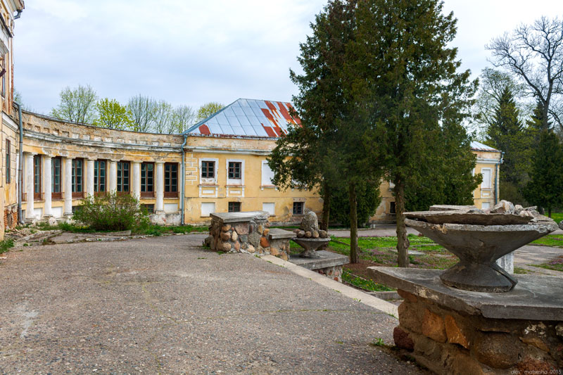 Свяцкі палац.